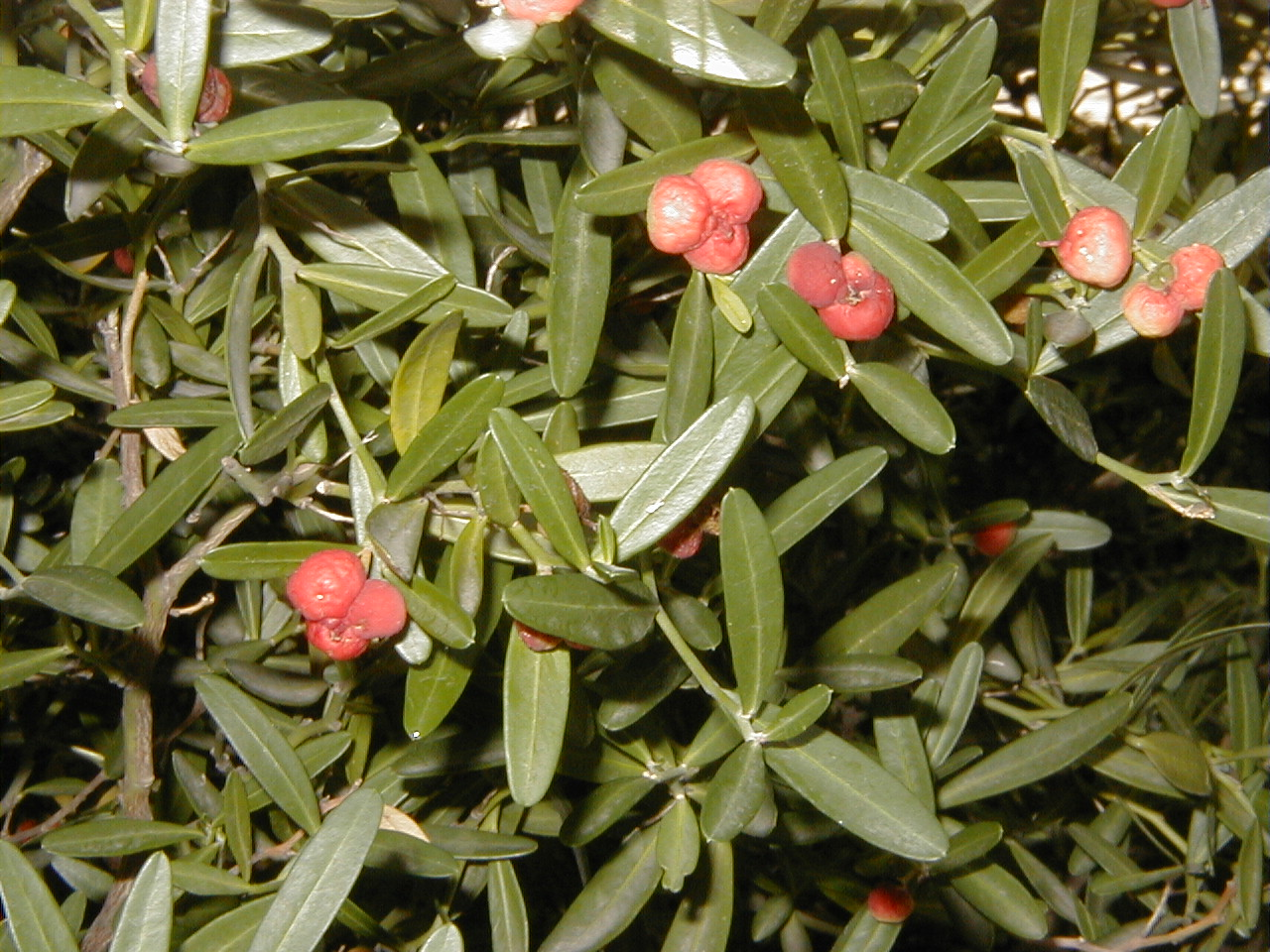 Cneorum tricoccon, frutos. Real Jardín Botánico, Madrid.